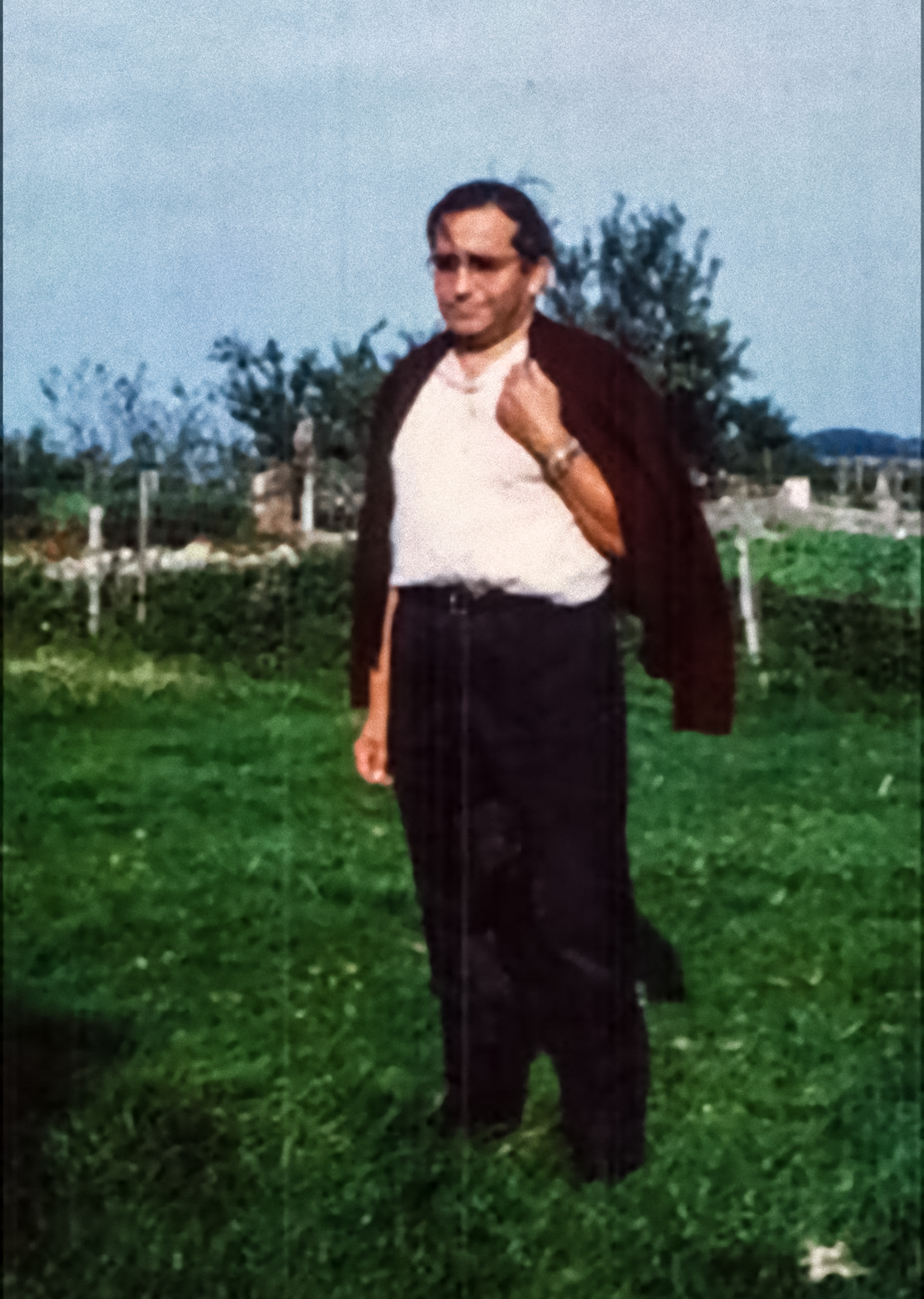 Gabriel Longueville, sacerdote y mártir de la Iglesia Riojana.